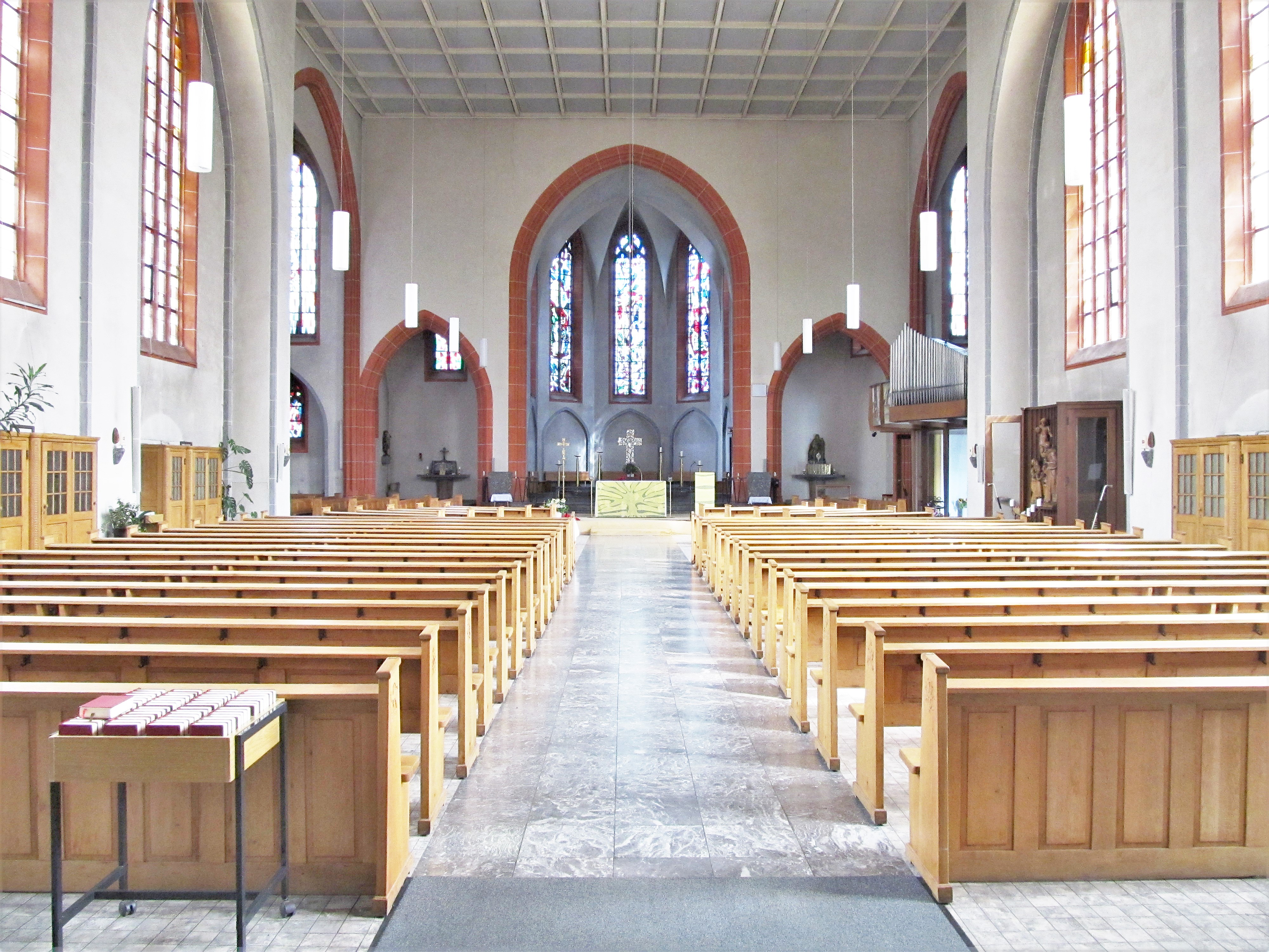 Blick ins Innere der katholischen Pfarrkirche St. Jakob in Saarbrücken, Saarland